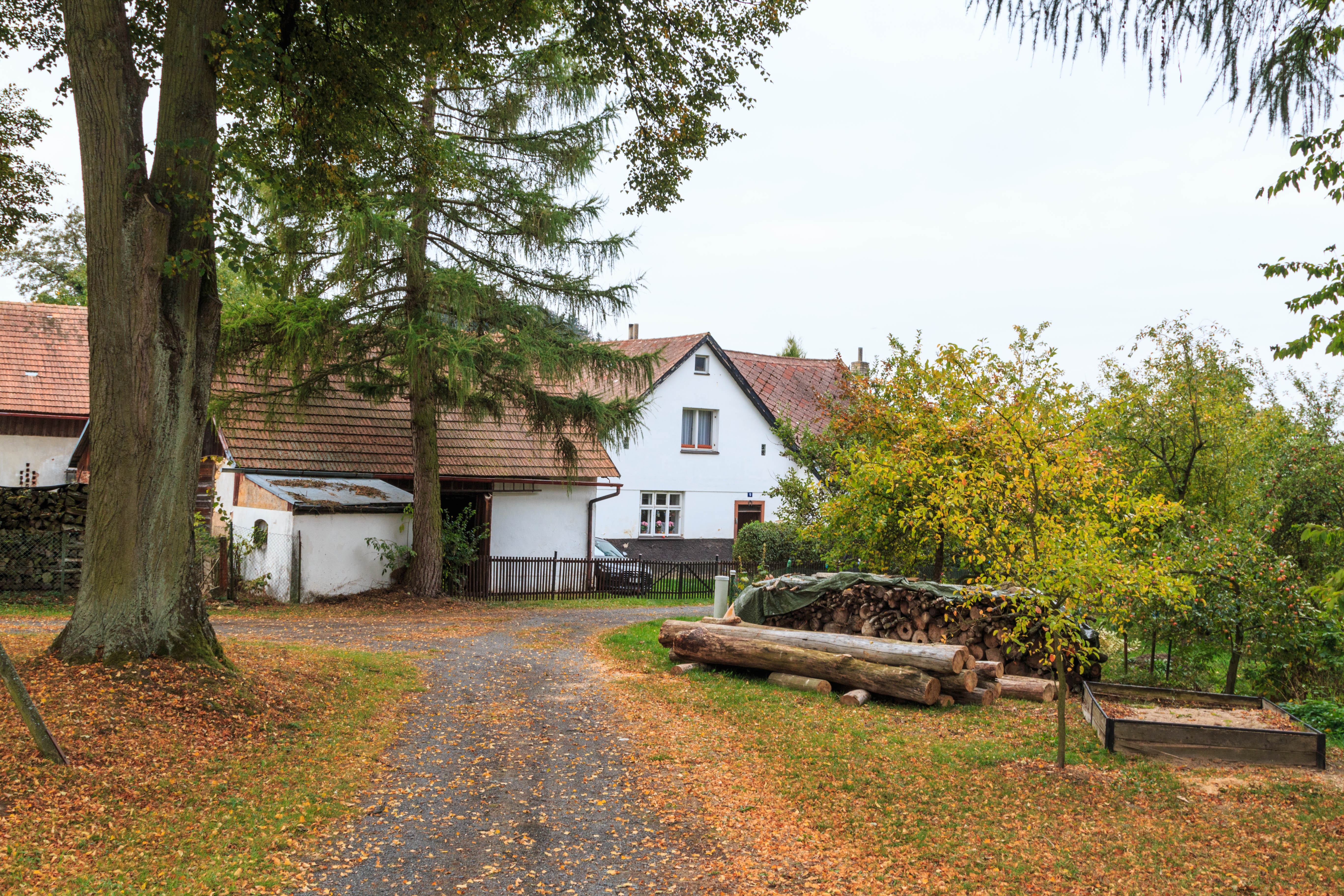 Předboř čp. 10